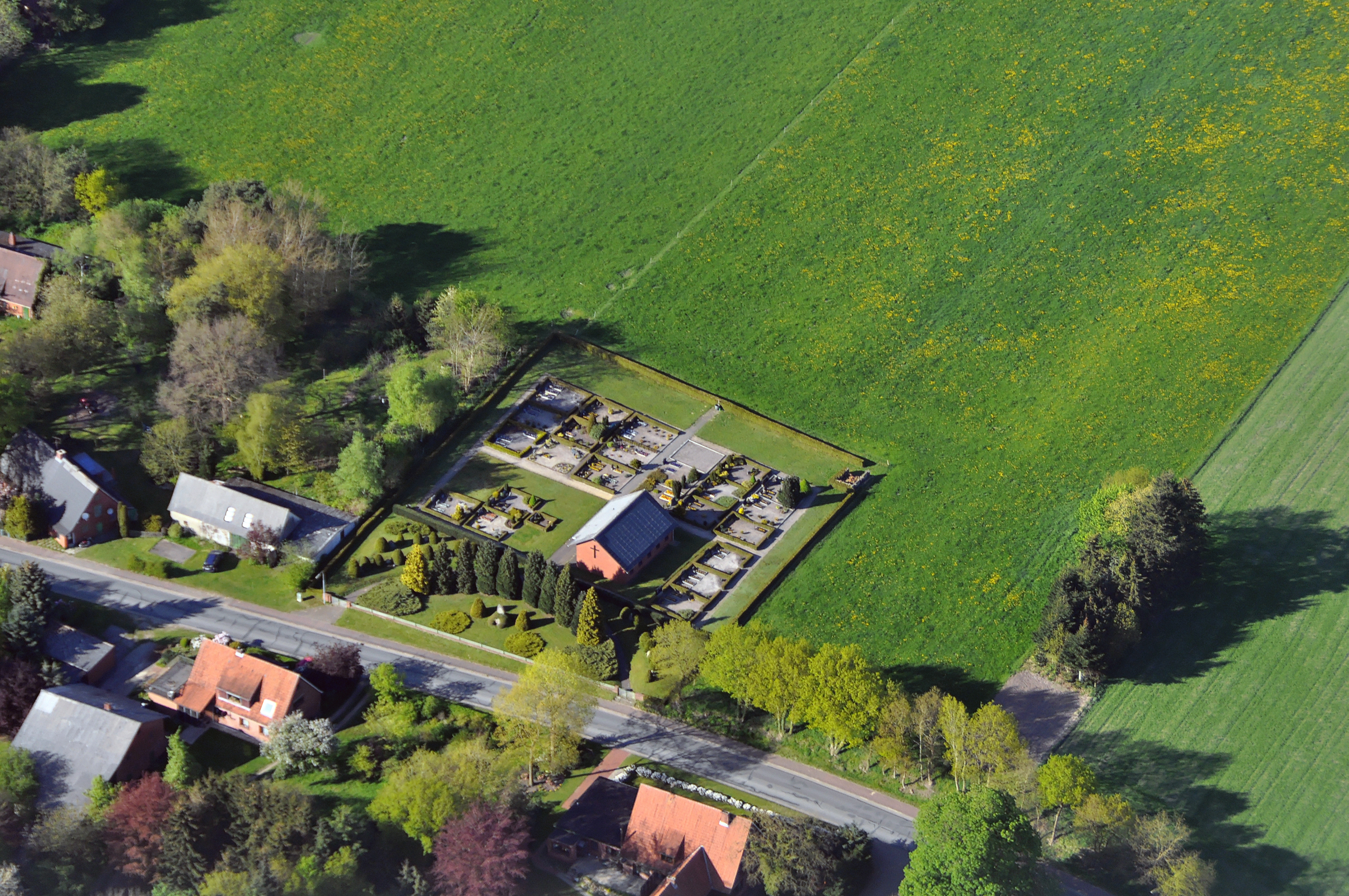 Luftbilder von der Nordseeküste 2012-05